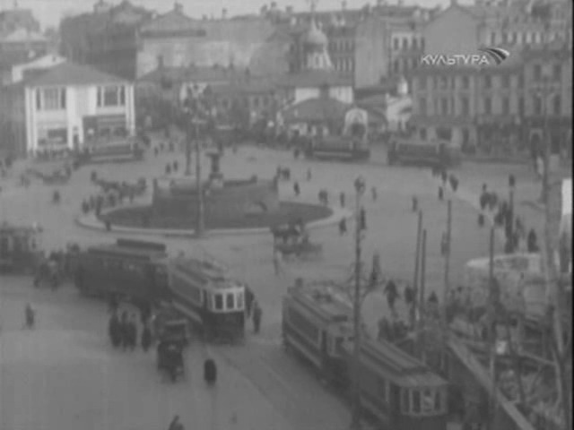 Лубянская площадь